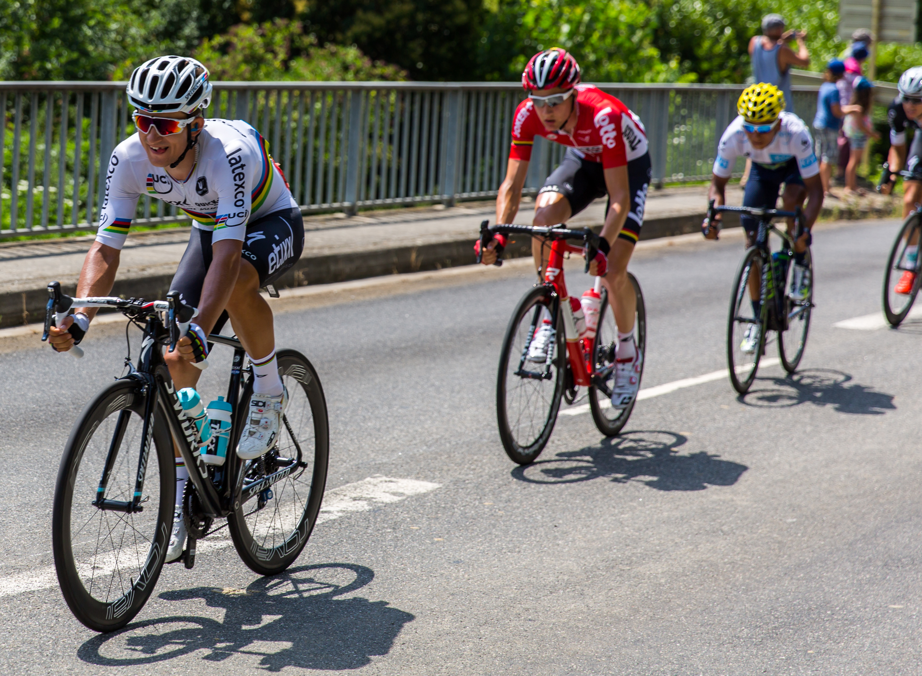 Michał Kwiatkowski (EQS) lors de la 13e étape. A l'arrière-plan : Nairo Quintana.